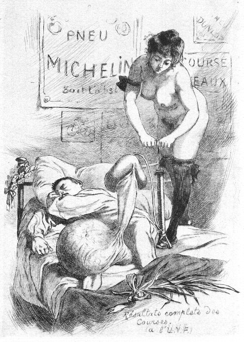 Résultats complets des courses Dessins de Martin van Maele. Illustration de La Grande Danse macabre des vifs, 1905.